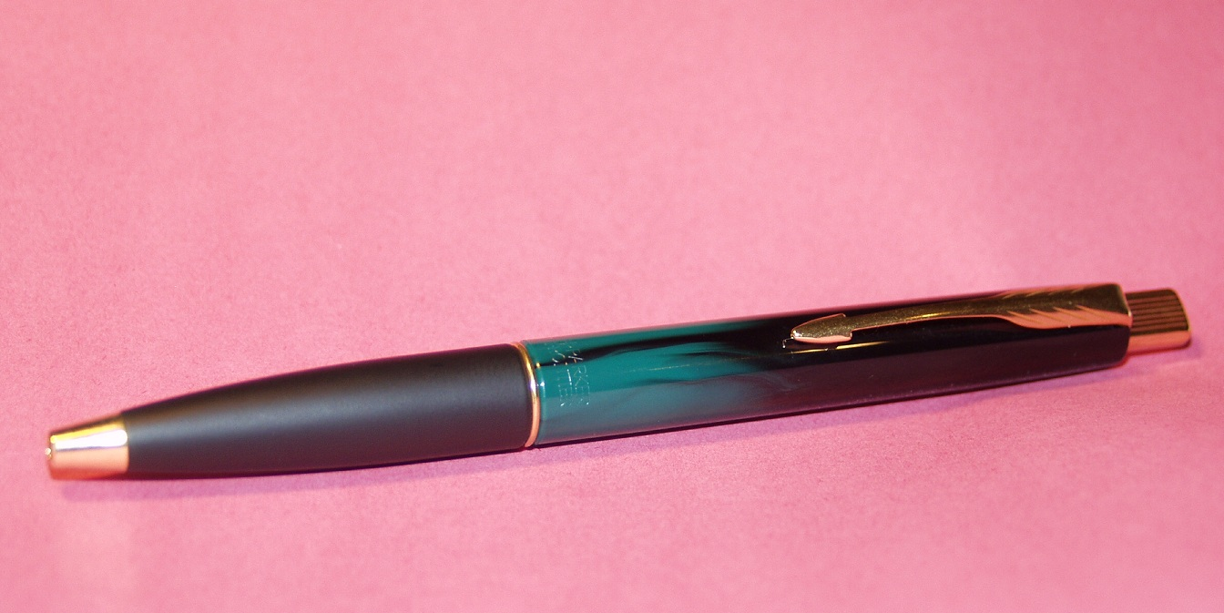 Parker-Frontier-Jubuleum